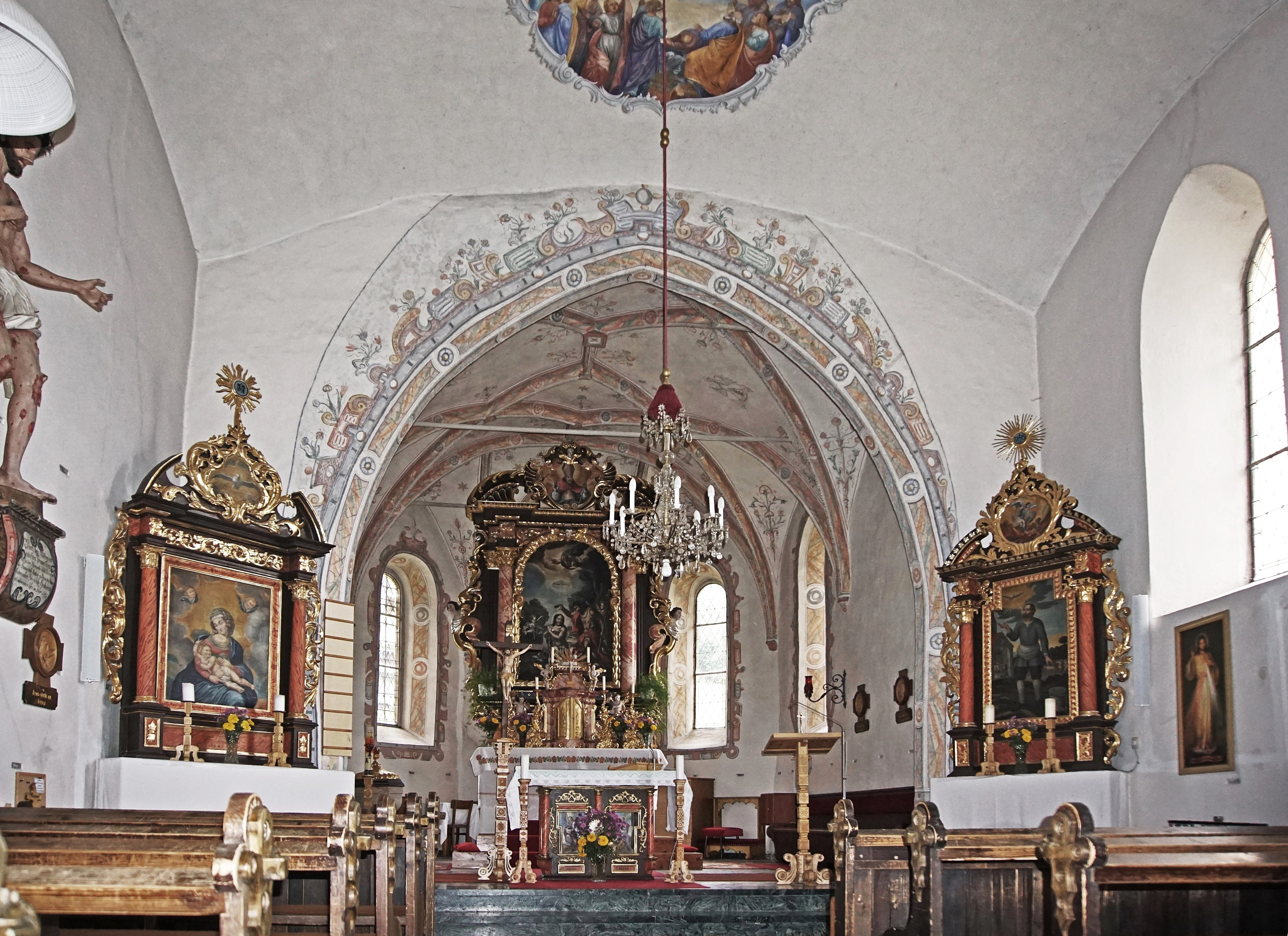 Kath. Pfarrkirche Hl. Johannes der Täufer in Kaning (Radenthein), Innenansicht